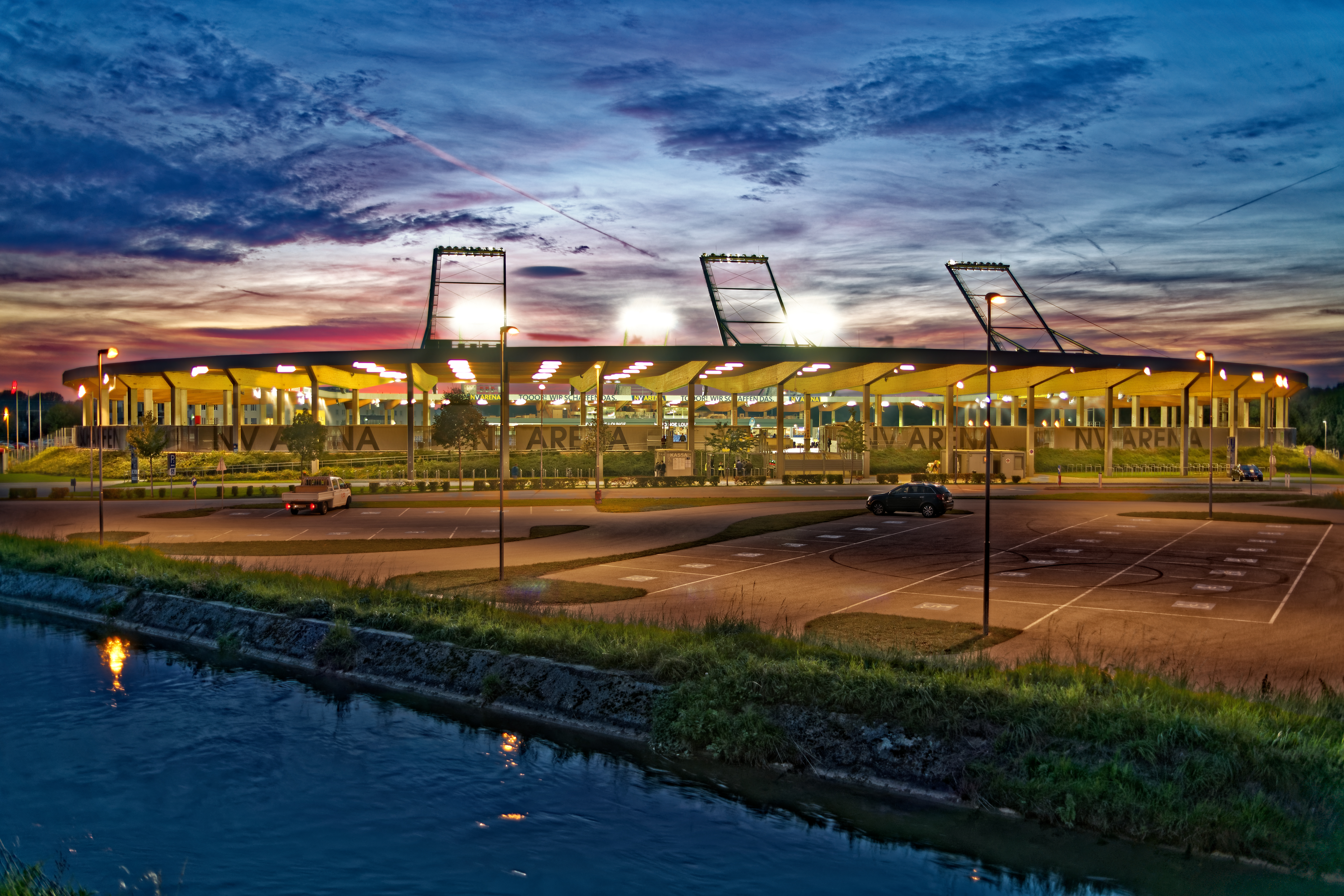 UEFA Women's Champions League 2017/18, Runde der letzten 32, SKN St. Pölten gegen Manchester City W.F.C. am 4.10.2017, Bild zeigt: NV Arena St. Pölten in der späten Abenddämmerung